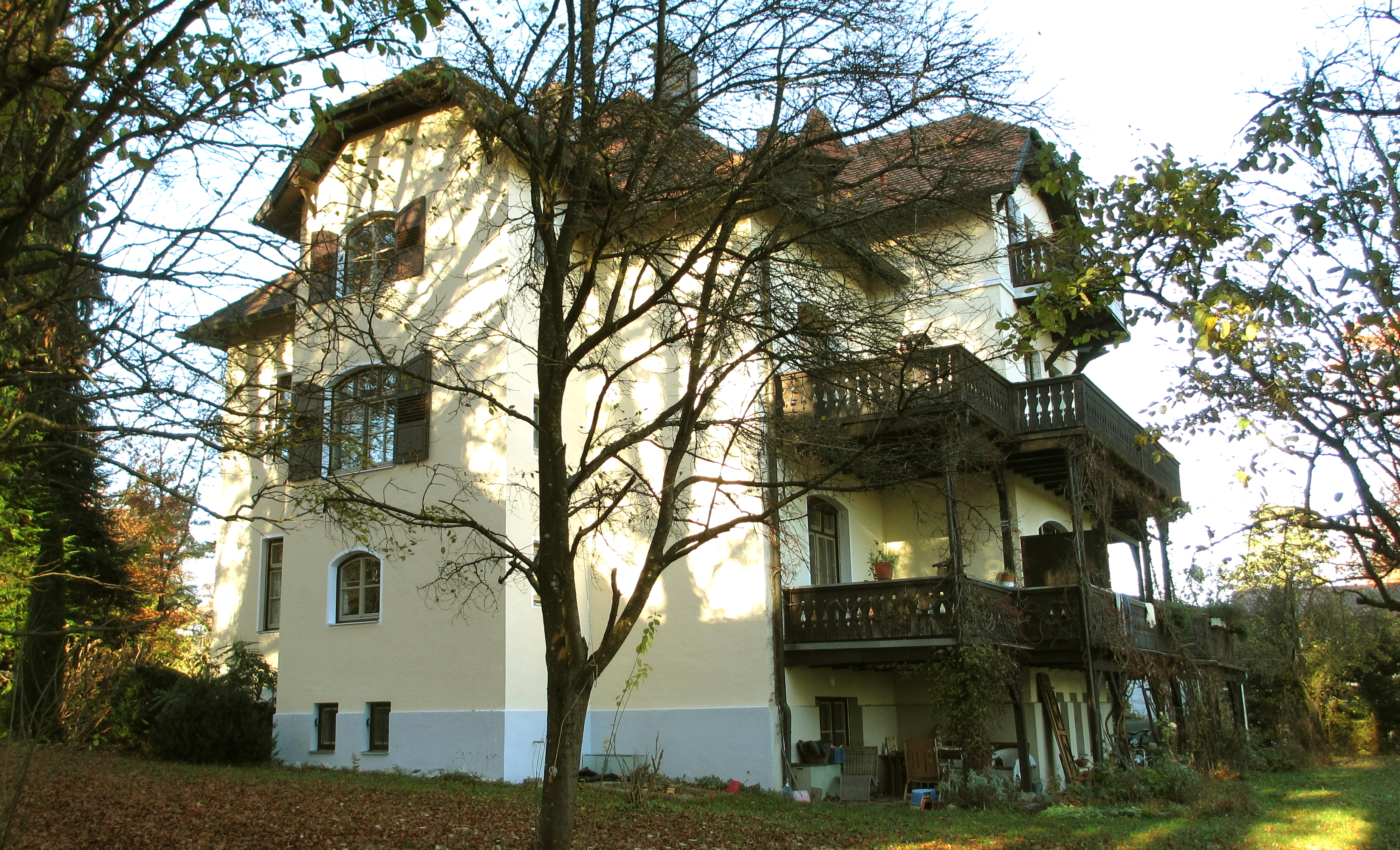 Starnberg, Josef-Fischhaber-Straße 27. Die ehemalige Villa des Malers Paul Thiem, ein zweigeschossiger Walmdachbau mit Mittelrisalit, Eckerkerturm und hölzernen Balkons, wurde 1897 von Karl Lemmes erbaut. Die Stadt Starnberg, in deren Besitz sich das Paul-Thiem-Atelier heute befindet, vergibt jährlich einen Kunstpreis für Malerei. Der 1. Preisträger dieses Kunstwettbewerbs darf dieses Atelier im Folgejahr kostenlos nutzen. This is a photograph of an architectural monument.